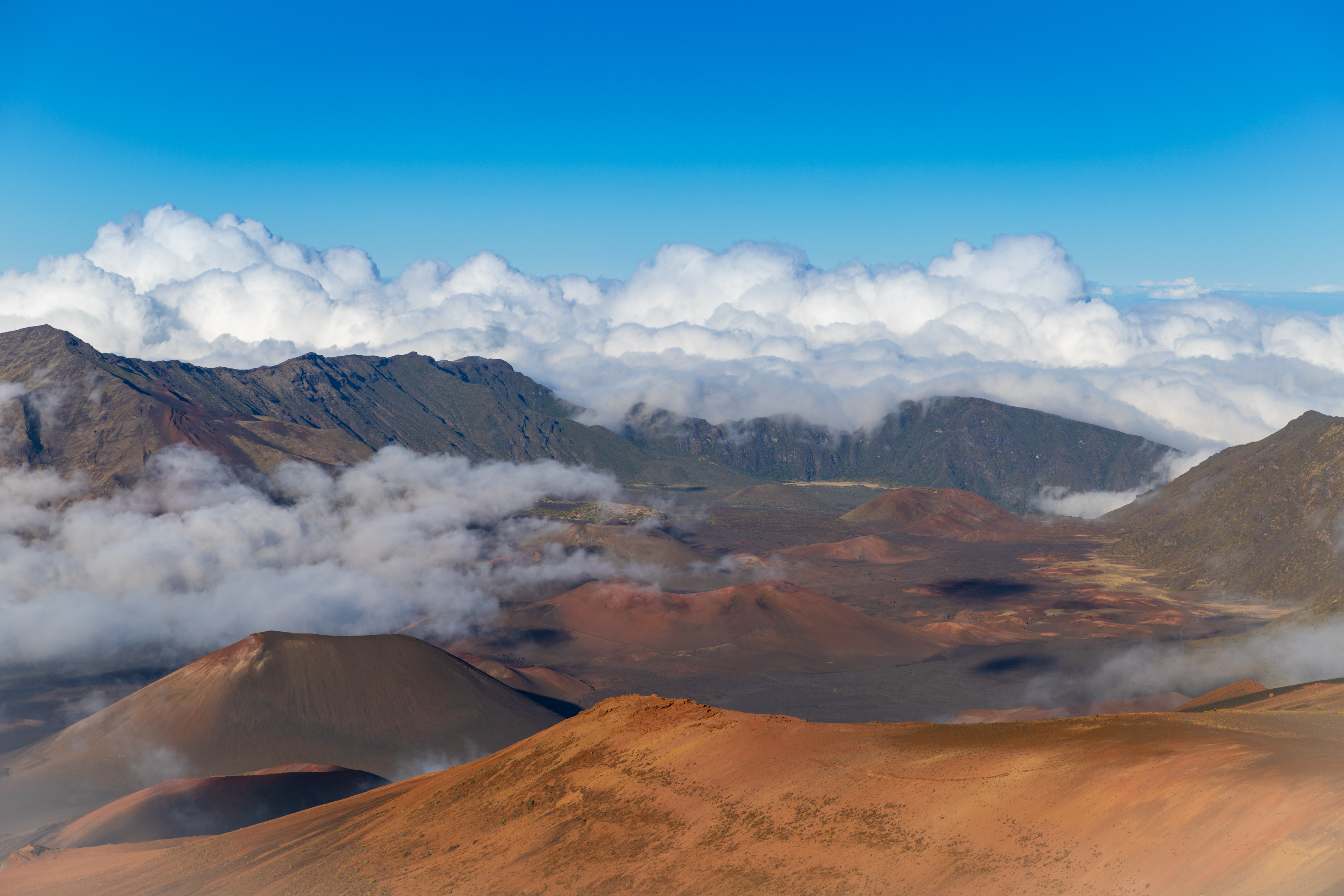 Mount Haleakala Crater Maui Hawaii